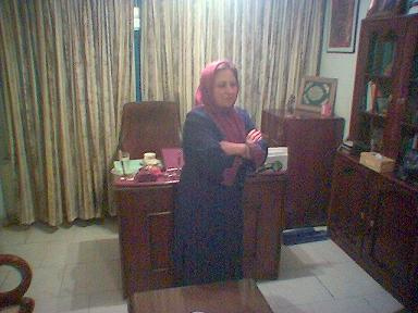 En abril de 2006 tuve la oportunidad de compartir unos minutos con la premio Nobel de la paz Shirin Ebadi en su oficina de Teherán, de quien tomé esta fotografía con mi móvil. شيرين عبادي في مكتبها بطهران